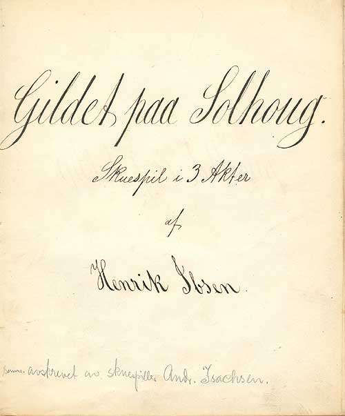 Gildet paa Solhoug, Det norske Theater